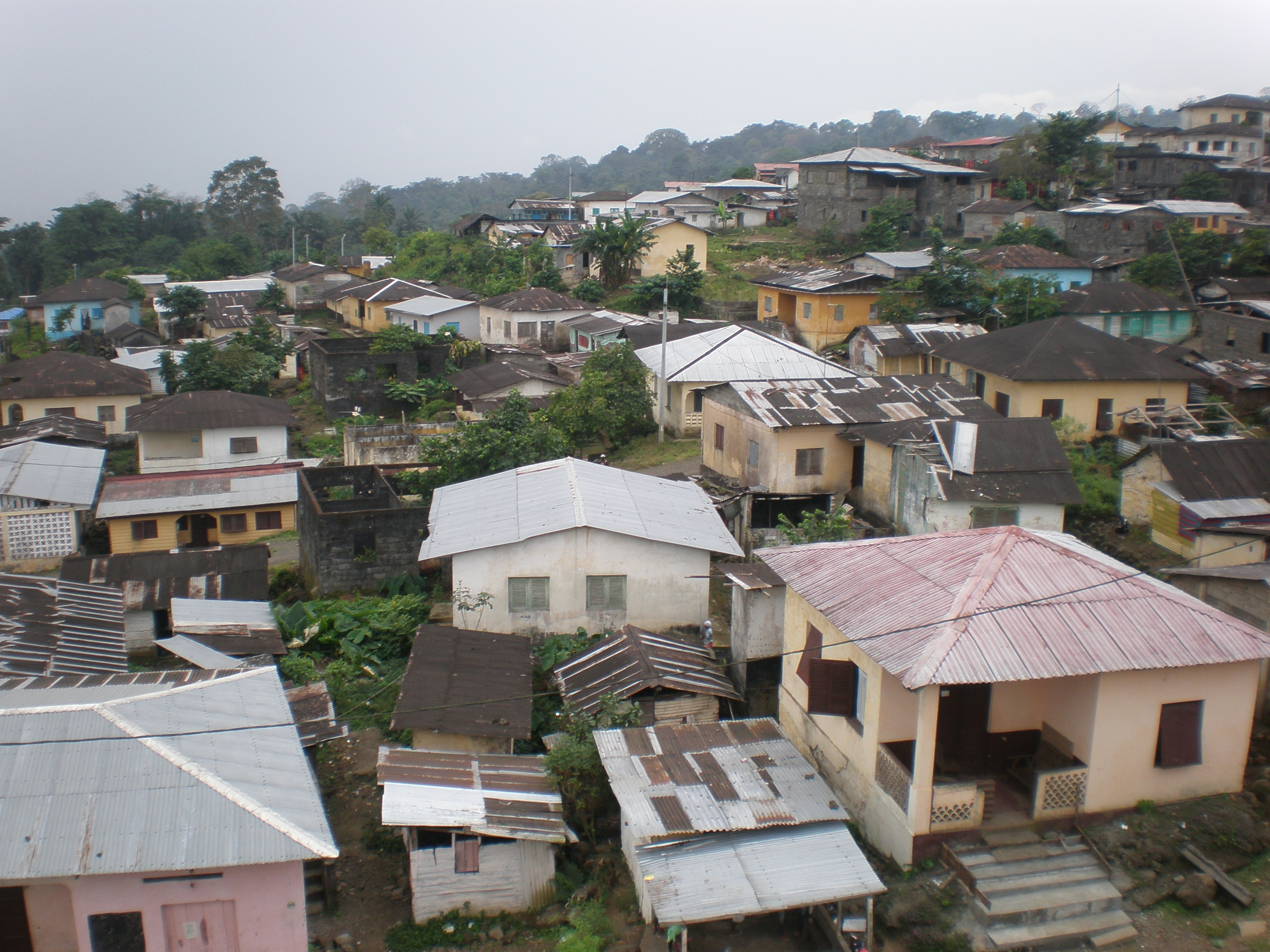 Desde el mirador de la ciudad podemos observar la parte Oeste de la ciudad